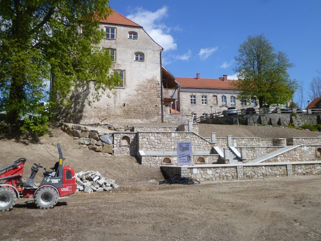 Burg Frauenstein Mining - Freilichtbühne